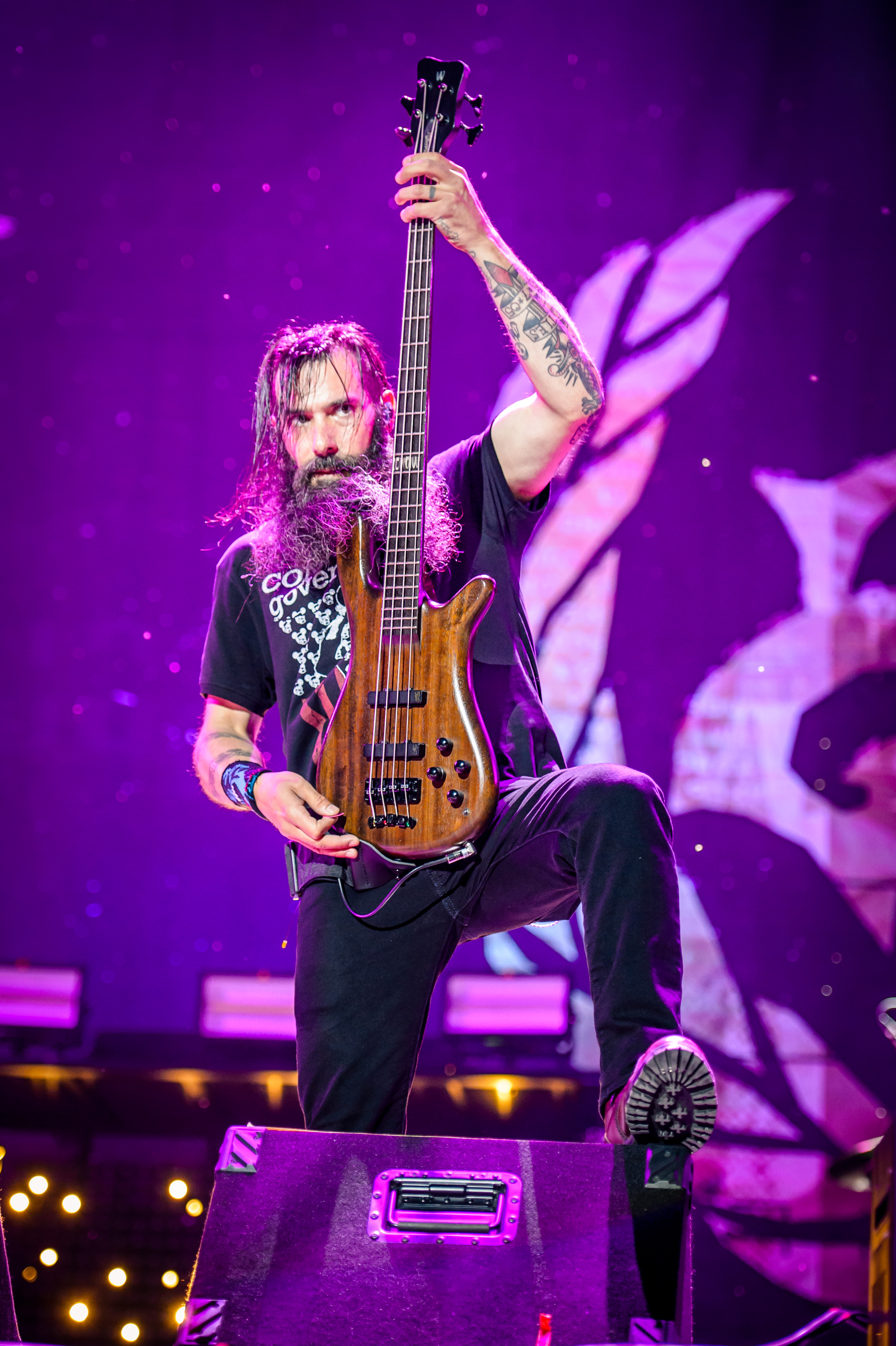 'Rock im Park 2018; Zeppelinfeld Nürnberg': 'Stone Sour'